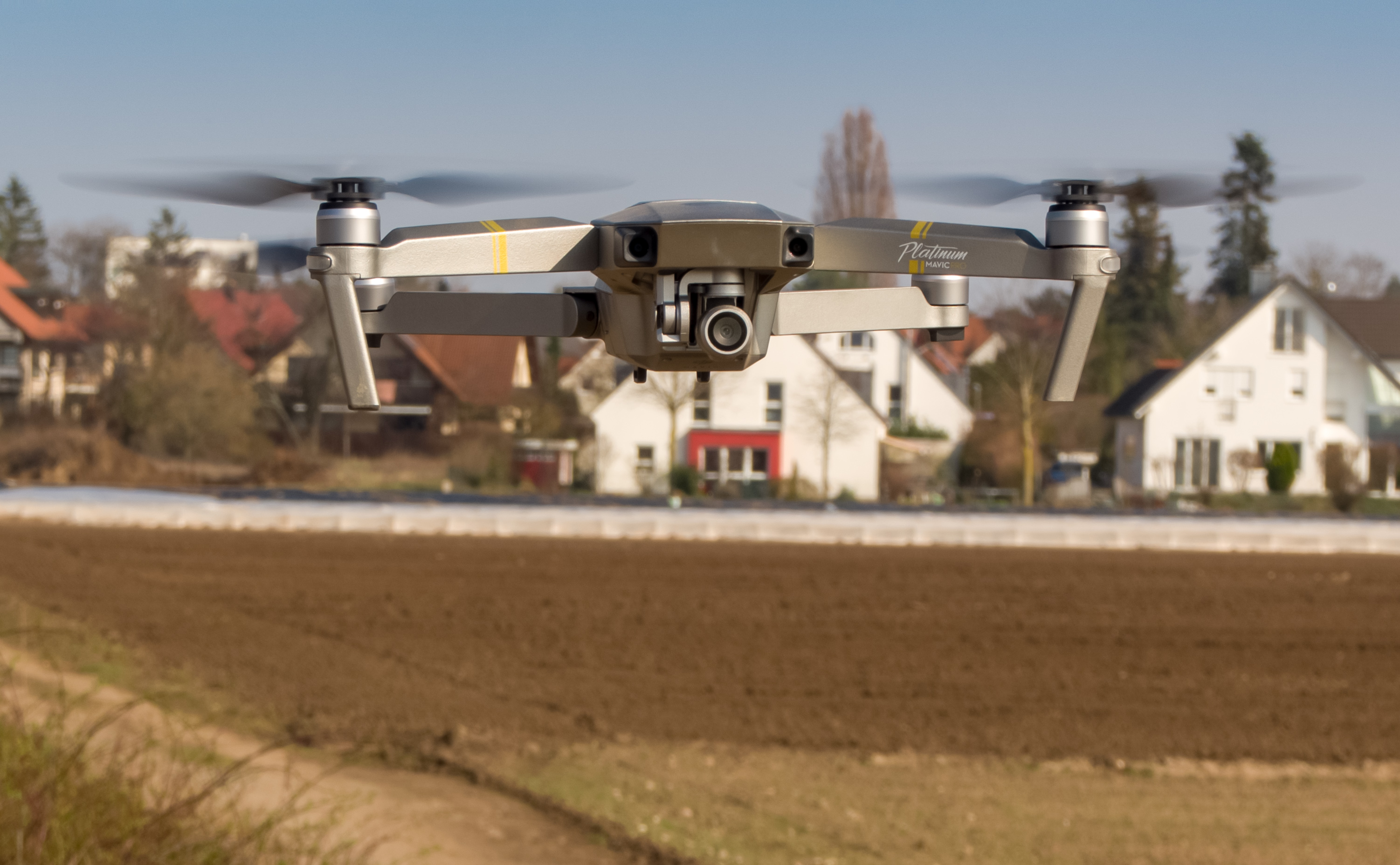 DJI Mavic Pro Platinum im Flug Flug mit Multicopter, Aufstiegsgenehmigung 008/2019 durch DFL Deutsche Flugsicherung vom 21. März 2019 Startfreigabe durch Tower Nürnberg 13.48 Uhr, Flug beendet 14.58 Uhr; genehmigte max. Flughöhe 300 m GND innerhalb der Kontrollzone des Flughafens Aufstieg direkt über der genehmigten Stelle, kein Streckenflug